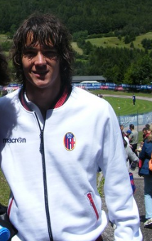 krhin